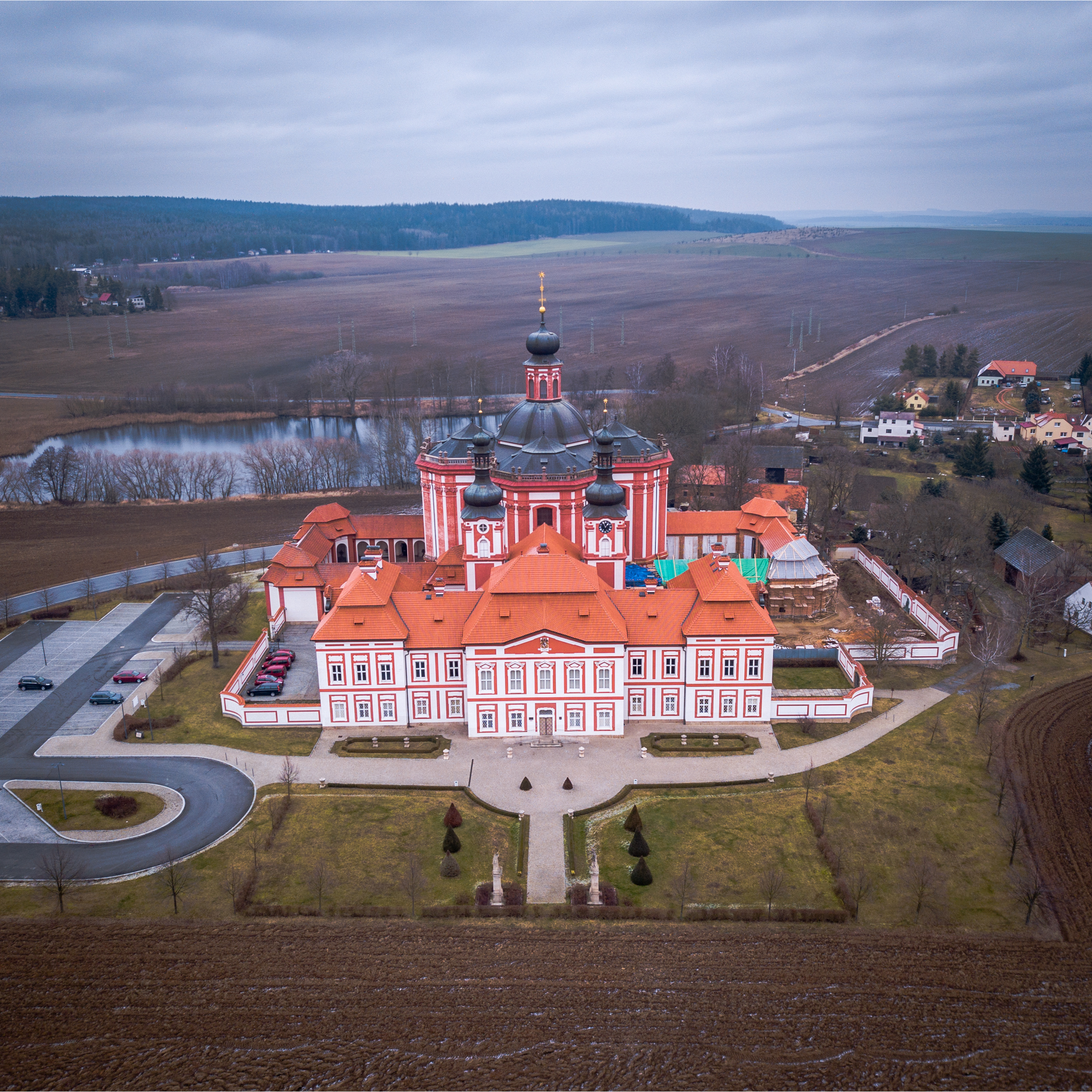 Mariánská Týnice s poutním kostelem Zvěstování Panny Marie z dronu - čelní pohled